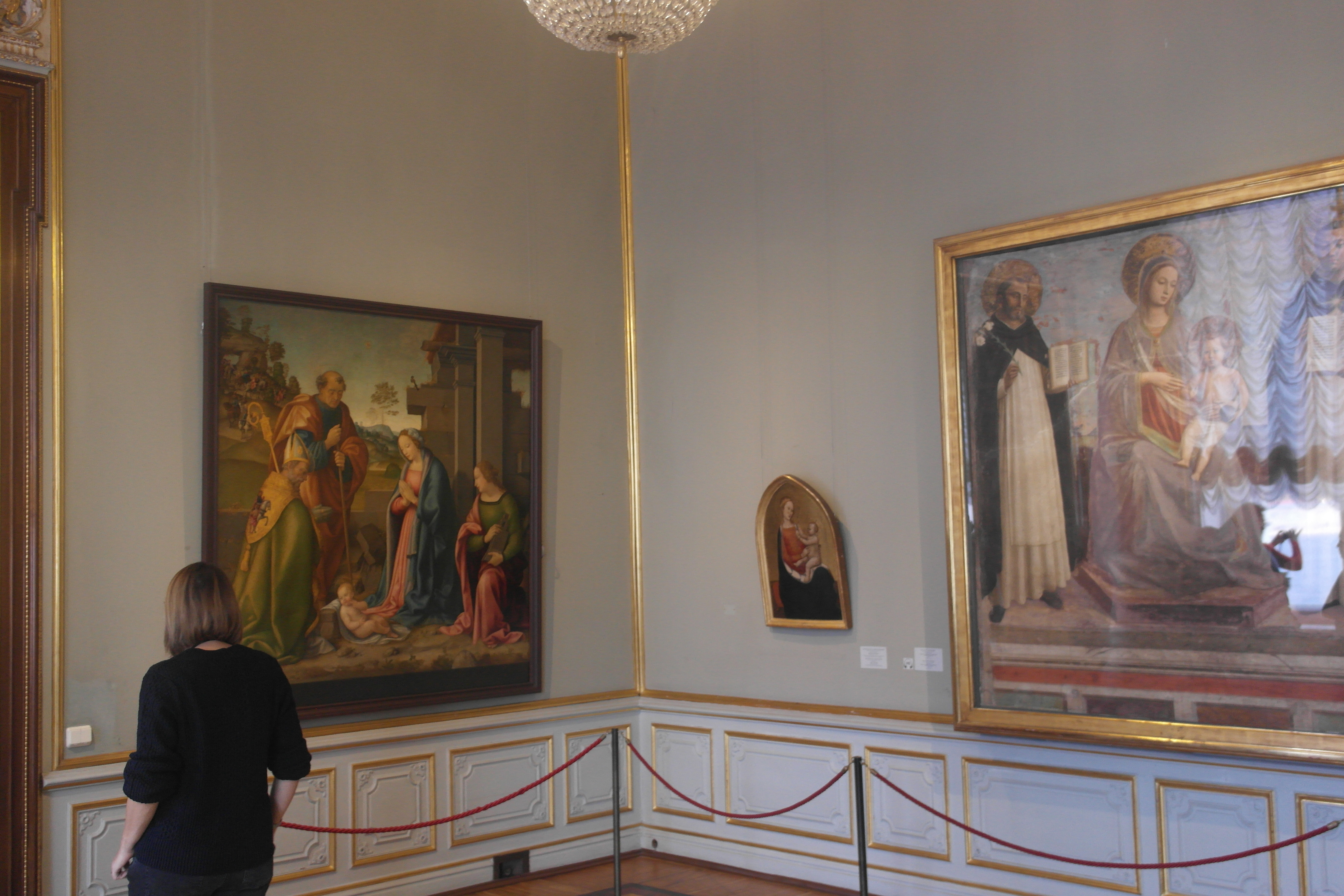 Картины Боттичини, Мастера милосердной Мадонны и фра Беато Анжелико